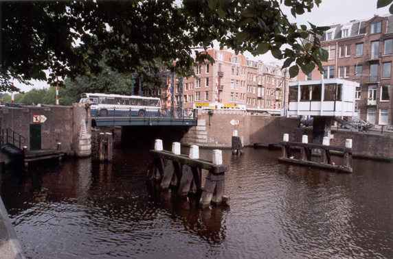 Pont près de Zeilstraat